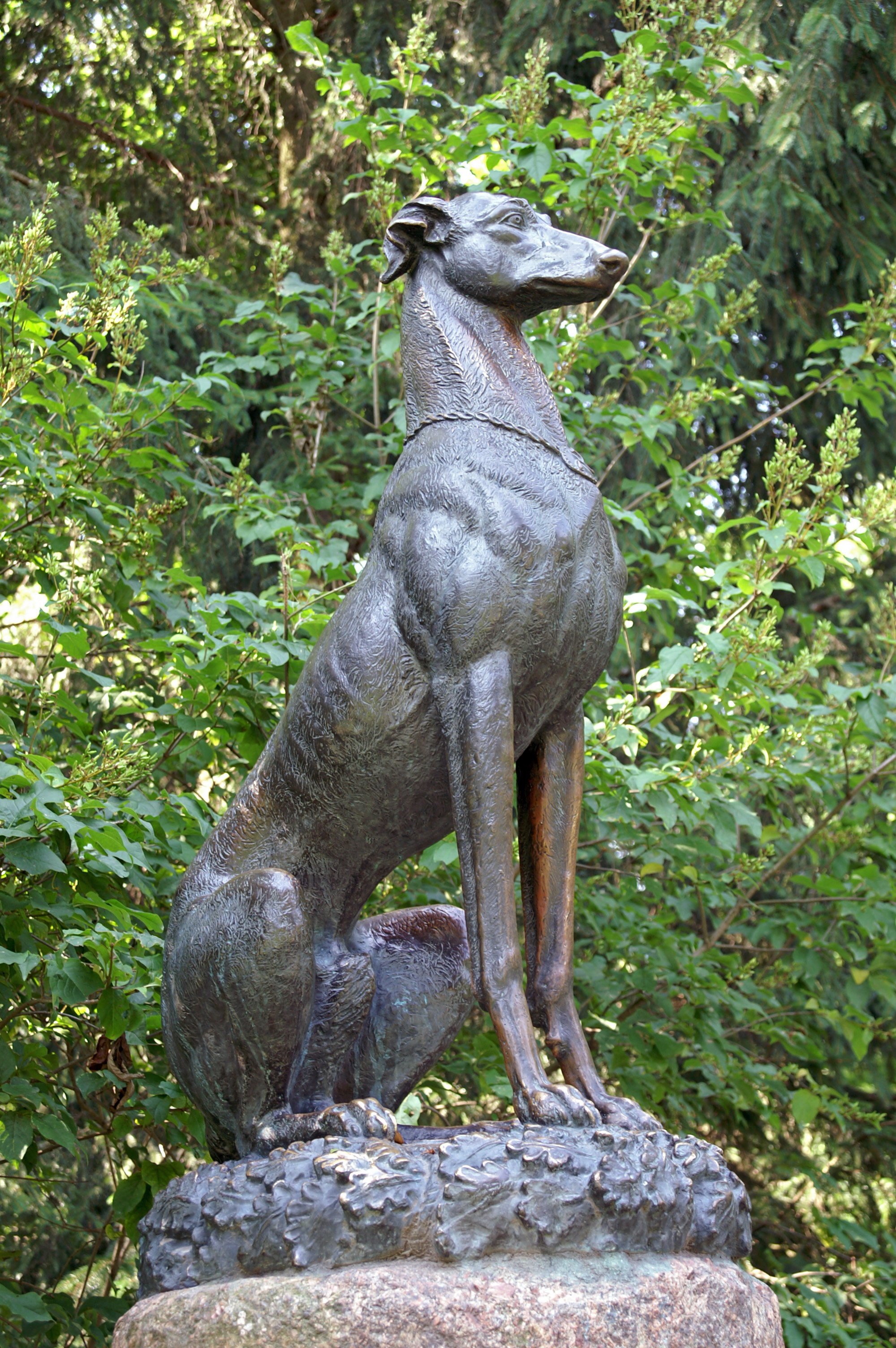 Беларуская (тарашкевіца): Палацава-паркавы ансамбль:замак-палац, паўднёвая і ўсходняя галерэі, камяніца, арсэнал з капліцай, брама, два прыбрамныя корпусы, паўночна-ўсходняя і паўднёва-заходняя галерэі, лядоўня, стайня;абарончыя збудаваньні і мост;тэрыторыя паркаў:Замкавы, Стары, Японскі, Ангельскі, Новы;водная сыстэма:Дзікі, Замкавы, Бэрнардынскі ставы. г. Нясьвіж This is a photo of Belarusian heritage monument. Reference number: 610Г000466 ( WLM)